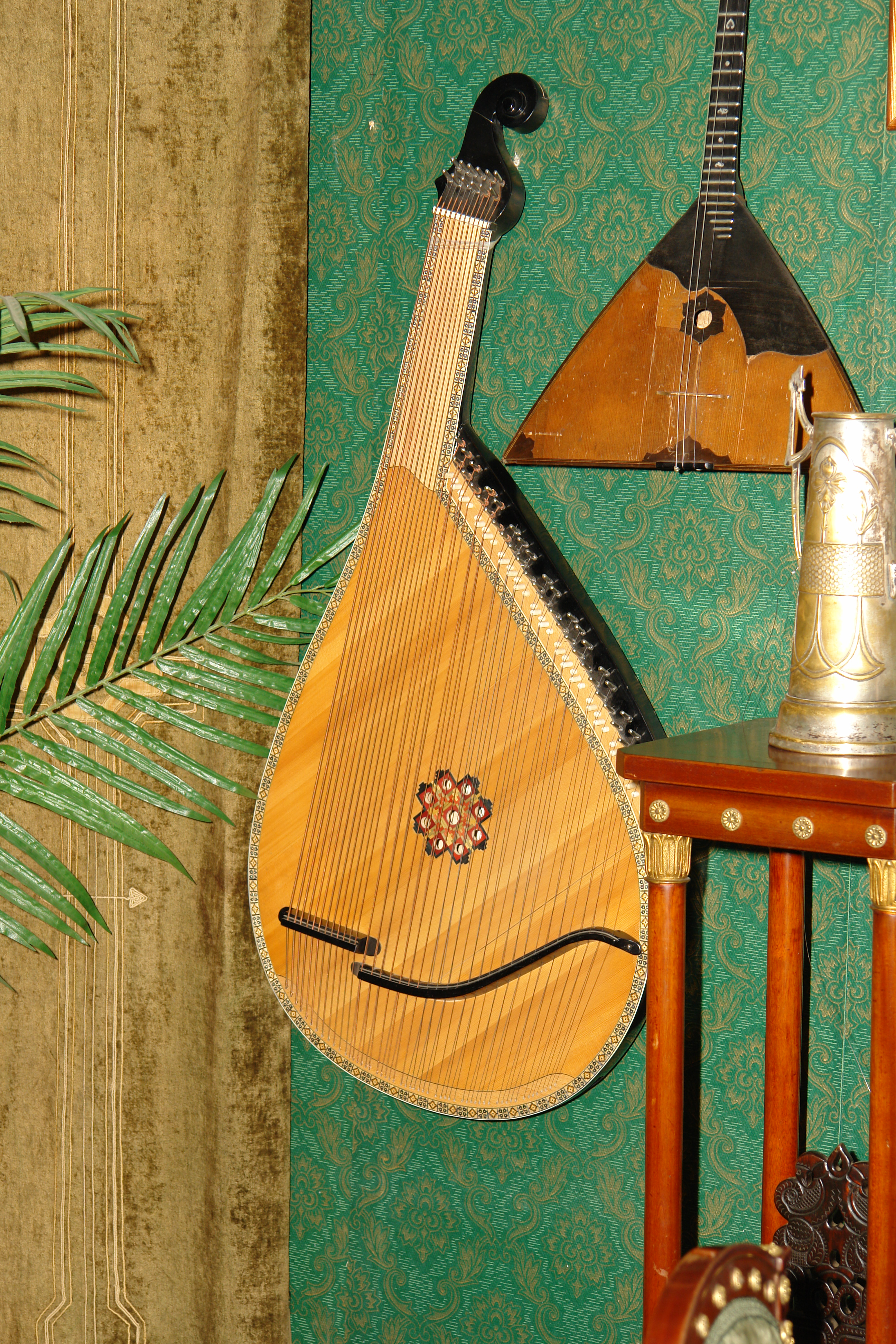 Бандура (XIX-начало XX вв.). Музей печати, Санкт-Петербург